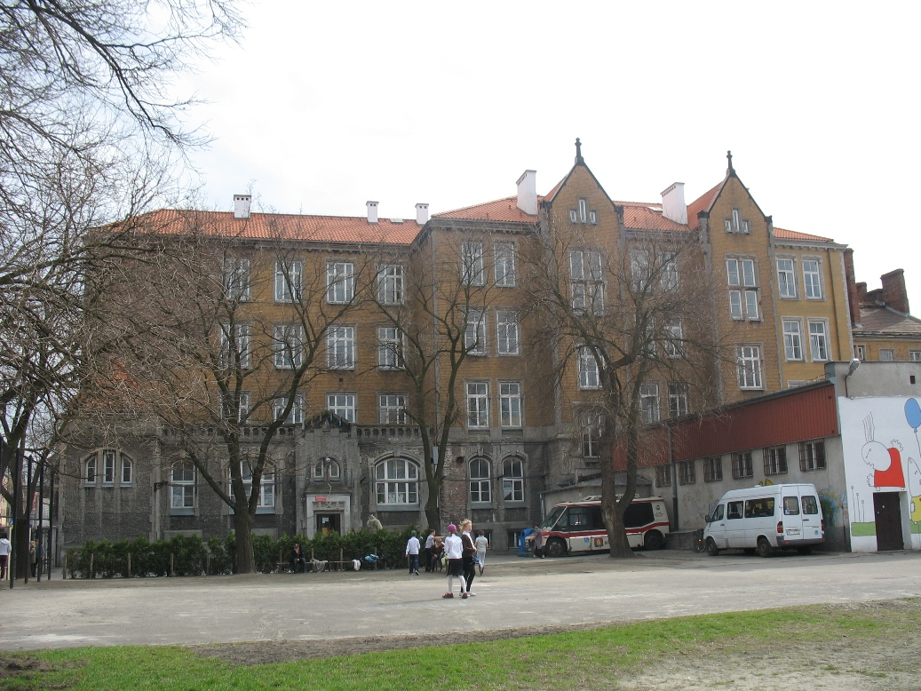 outside view